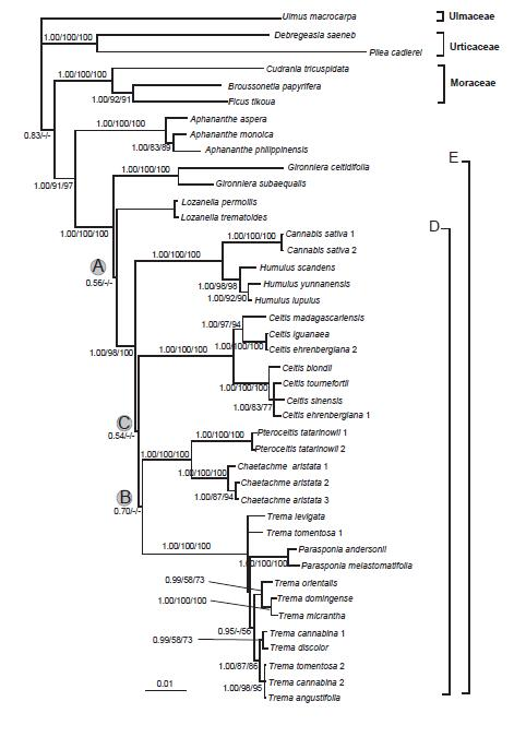 Filogenia adaptada de Yang et. al. (2013).